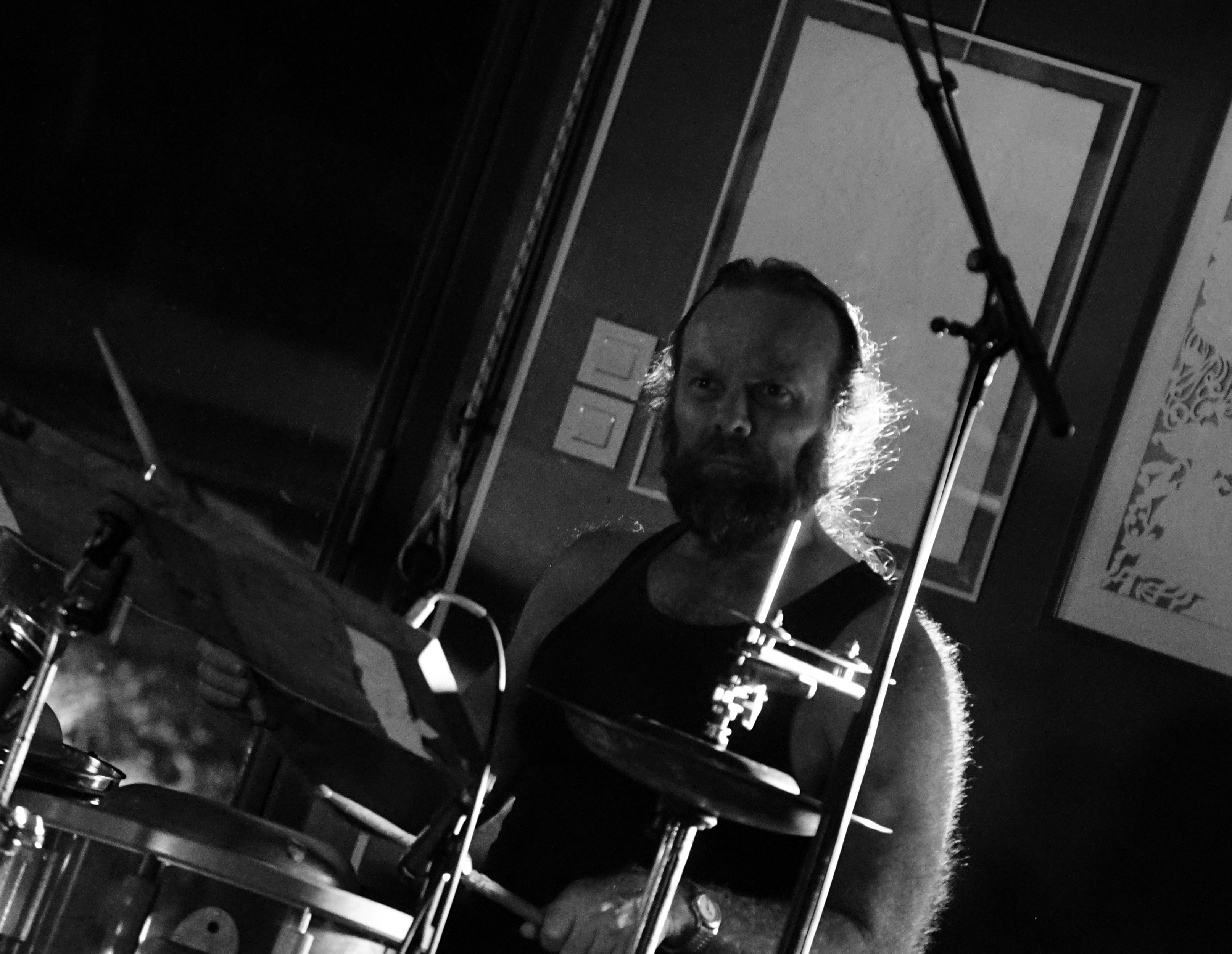 cf. le titre.